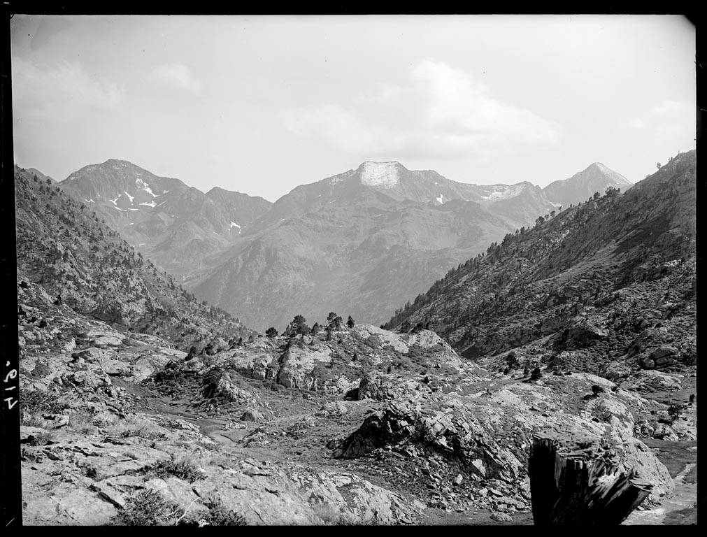 Imatge